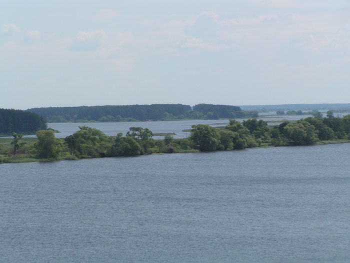 Акватория Иваньковского водохранилища в том месте, где Волга выходит из своего естественного русла.